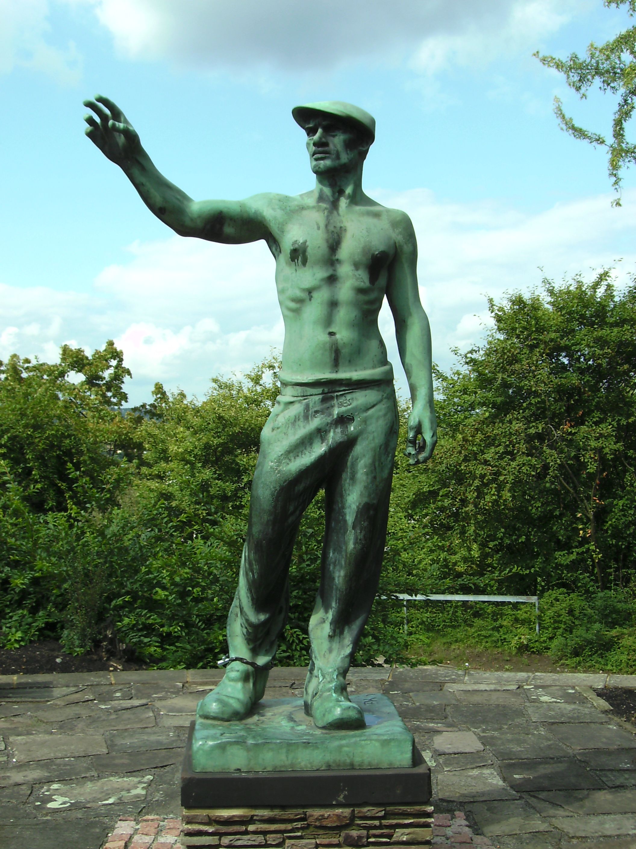 Plastik (Bronze) von Fritz Koelle: Der Walzmeister. Standort: BBZ St. Ingbert